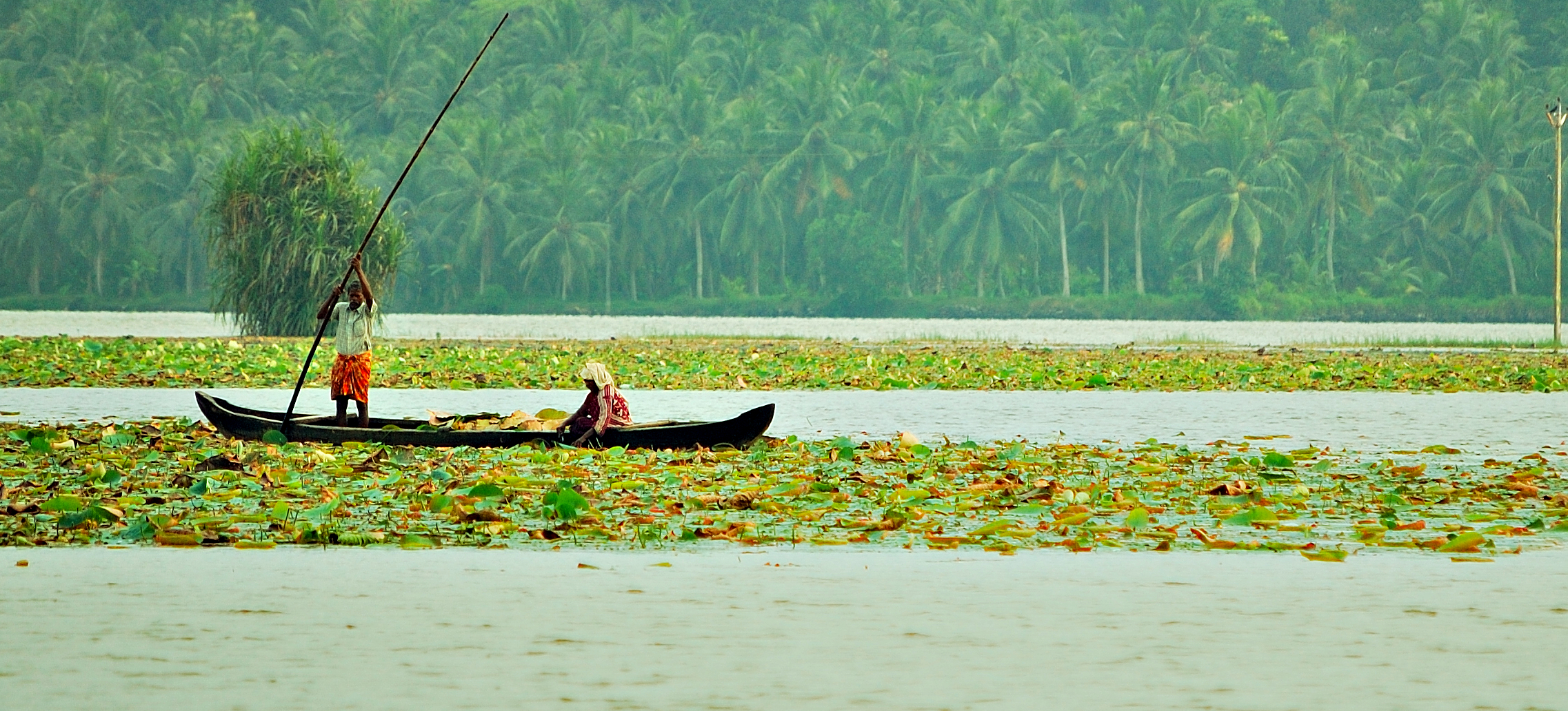 Vellayani, Trivandrum.